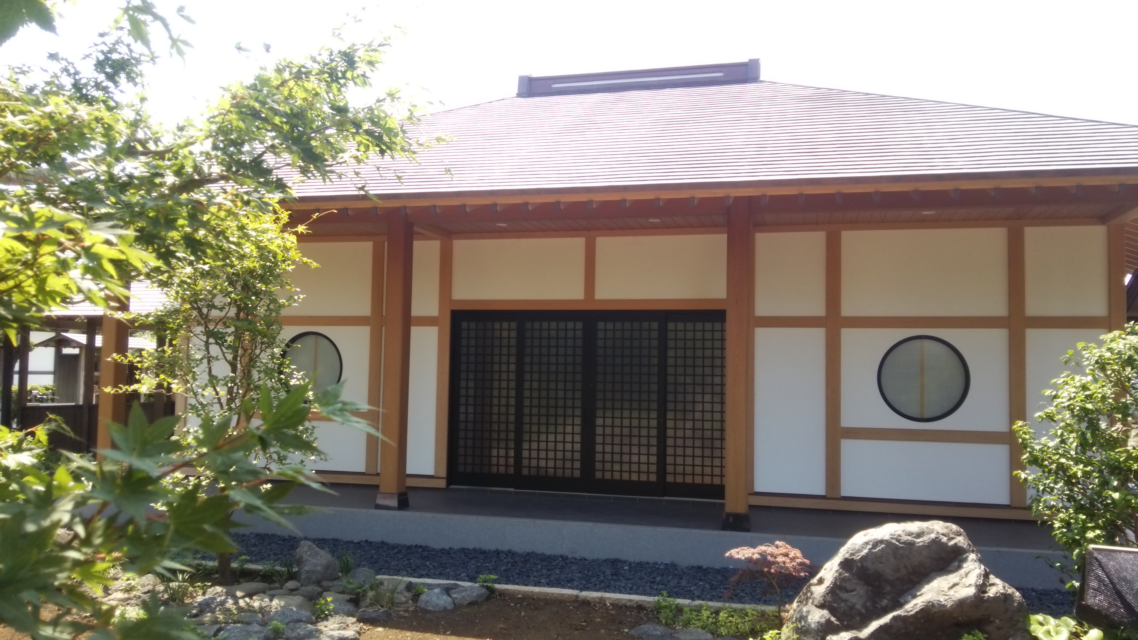 位牌堂前景